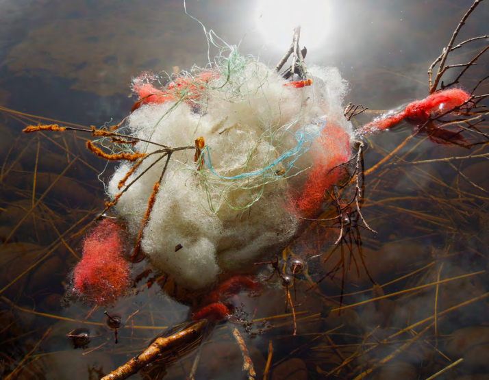 Basuritas del fin del mundo (2012), Cortecía de la artista y Lehmann Maupin, New York. Fotografía de James O’Hern